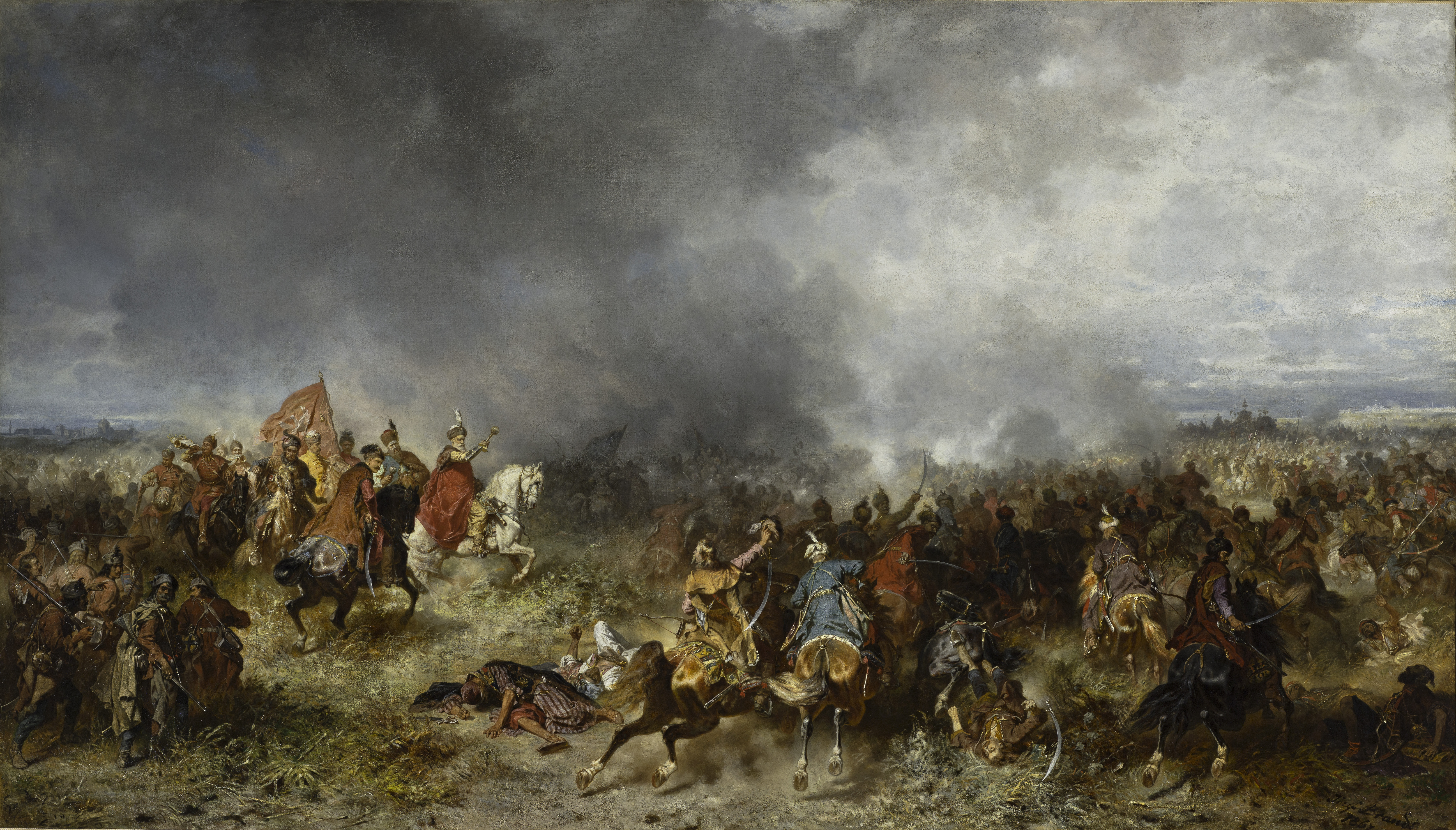 Bitwa pod Chocimiem, 1621; na białym koniu z buławą hetman Jan Karol Chodkiewicz